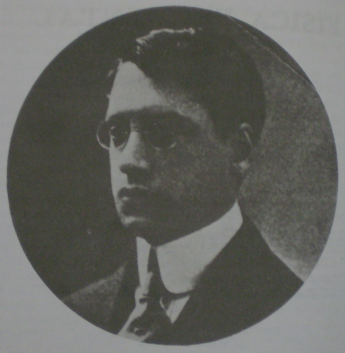 Julio R. Castiñeiras